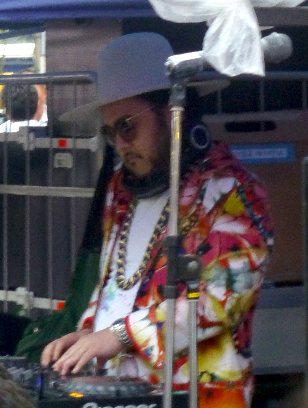 ソイル・アンド・ピンプ・セッションズの社長 (Shacho from SOIL&PIMP SESSIONS)